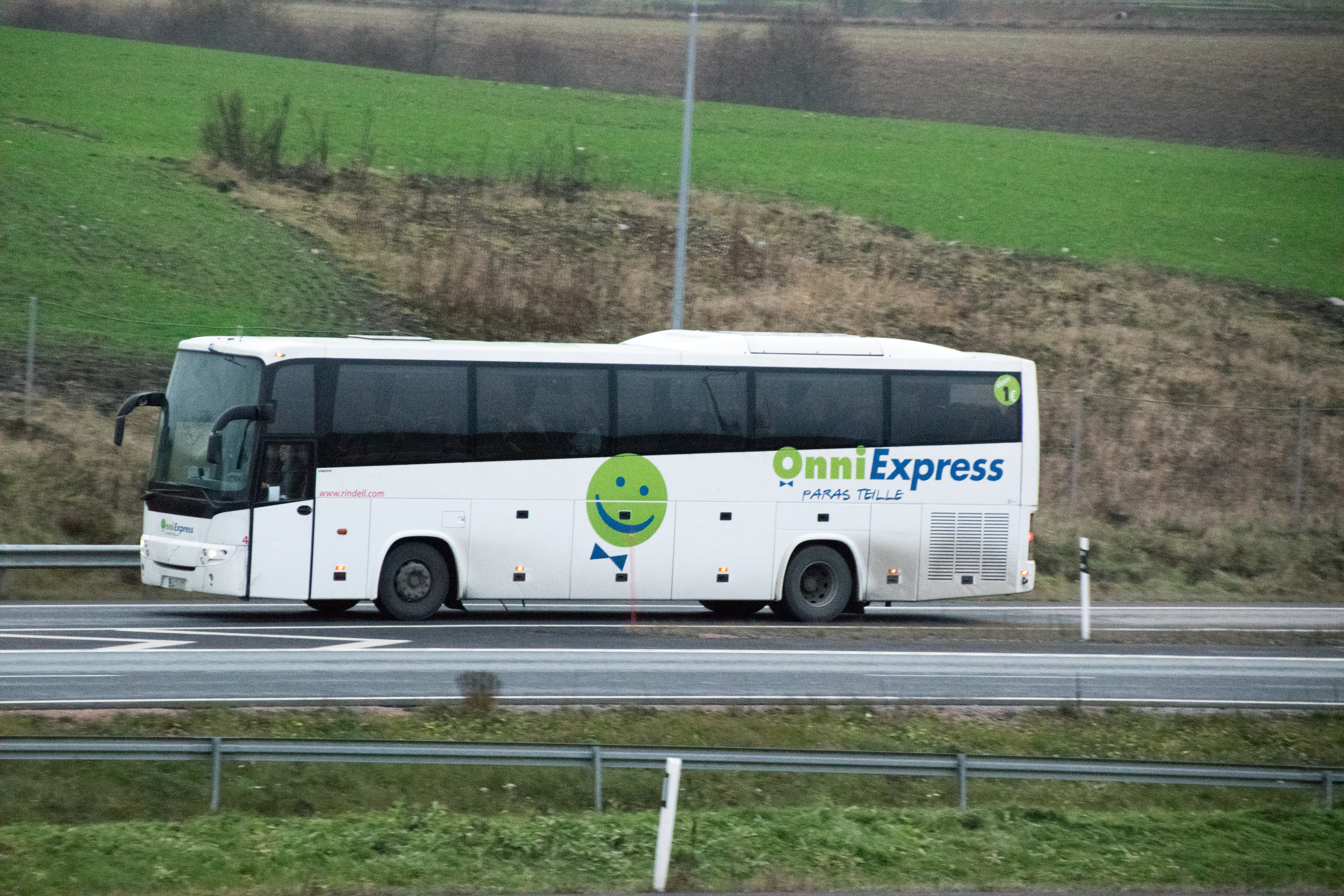 Omniexpress linja-auto